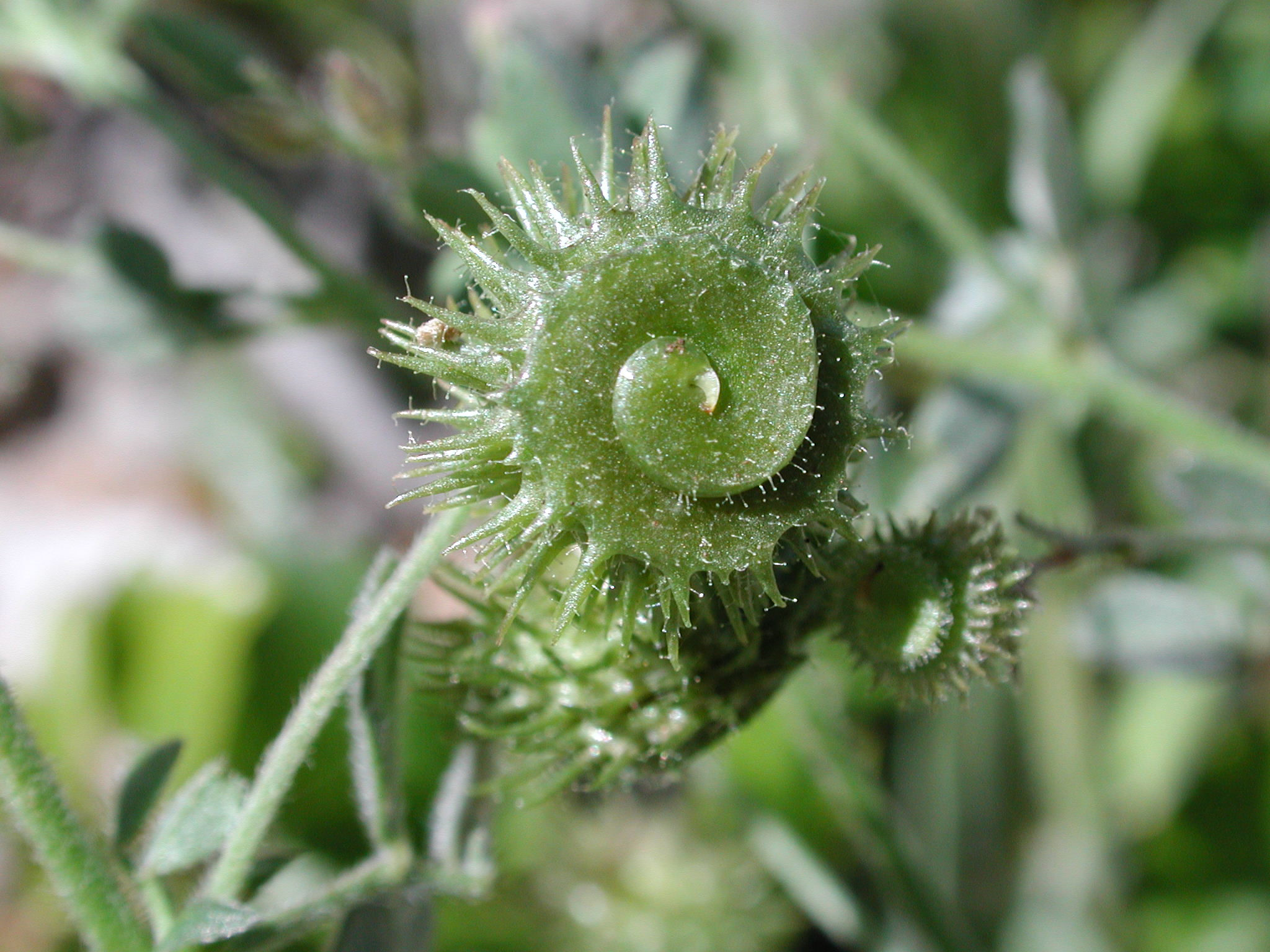 particolare del frutto maturo di Medicago disciformis